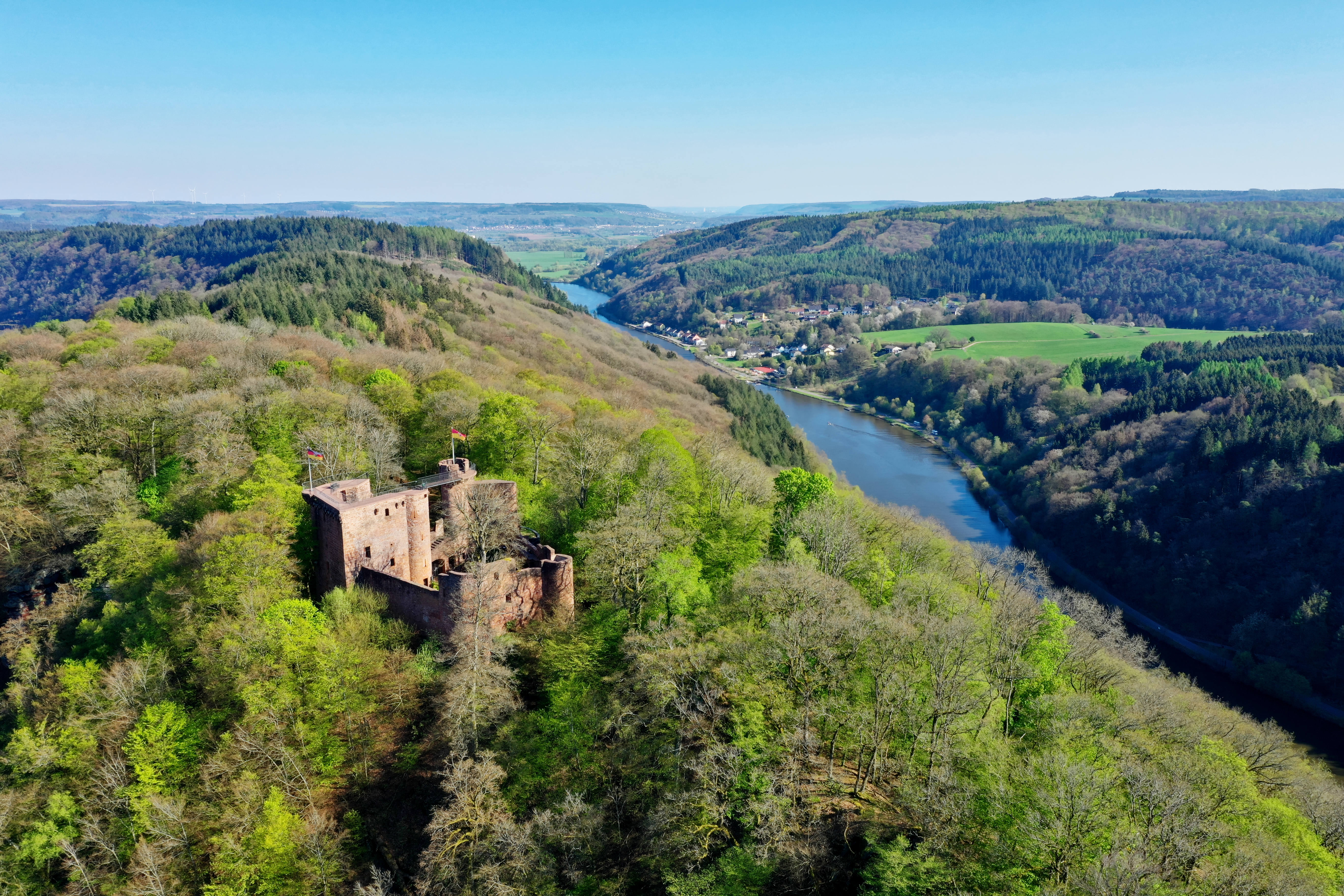 Luftbild der Burg-Neu Montclair auf dem Umlaufberg der Saarschleife mit Dreisbach und Saar im Hintergrund.